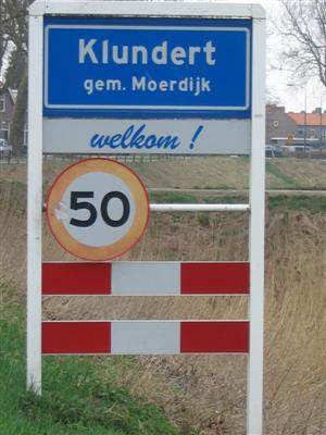 Plaatsnaambord van Klundert